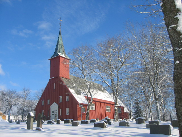 Leinstrand kirke i Trondheim.